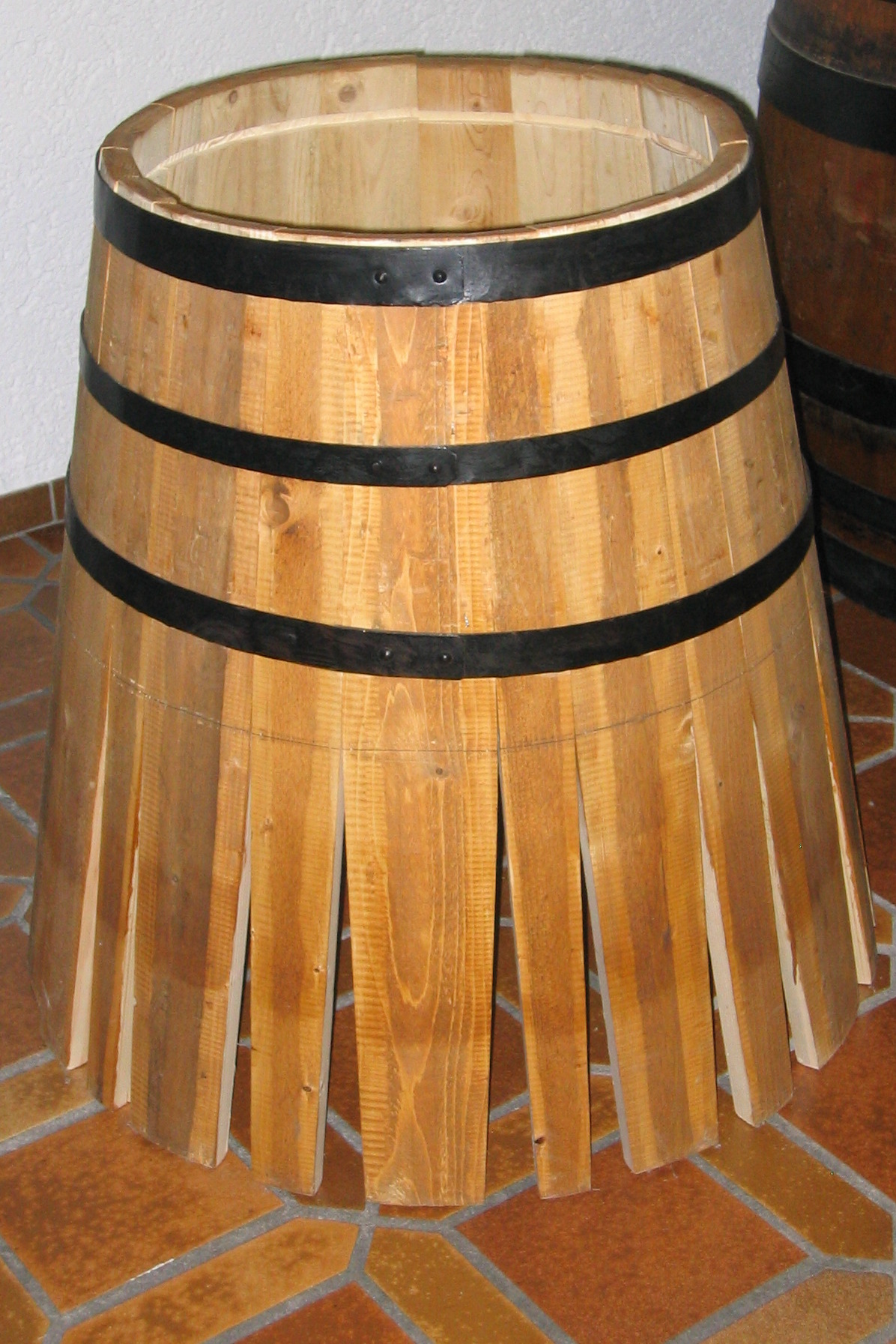 aufgenommen während einer Brauerei Besichtigung bei Fürstenberg in Donaueschingen